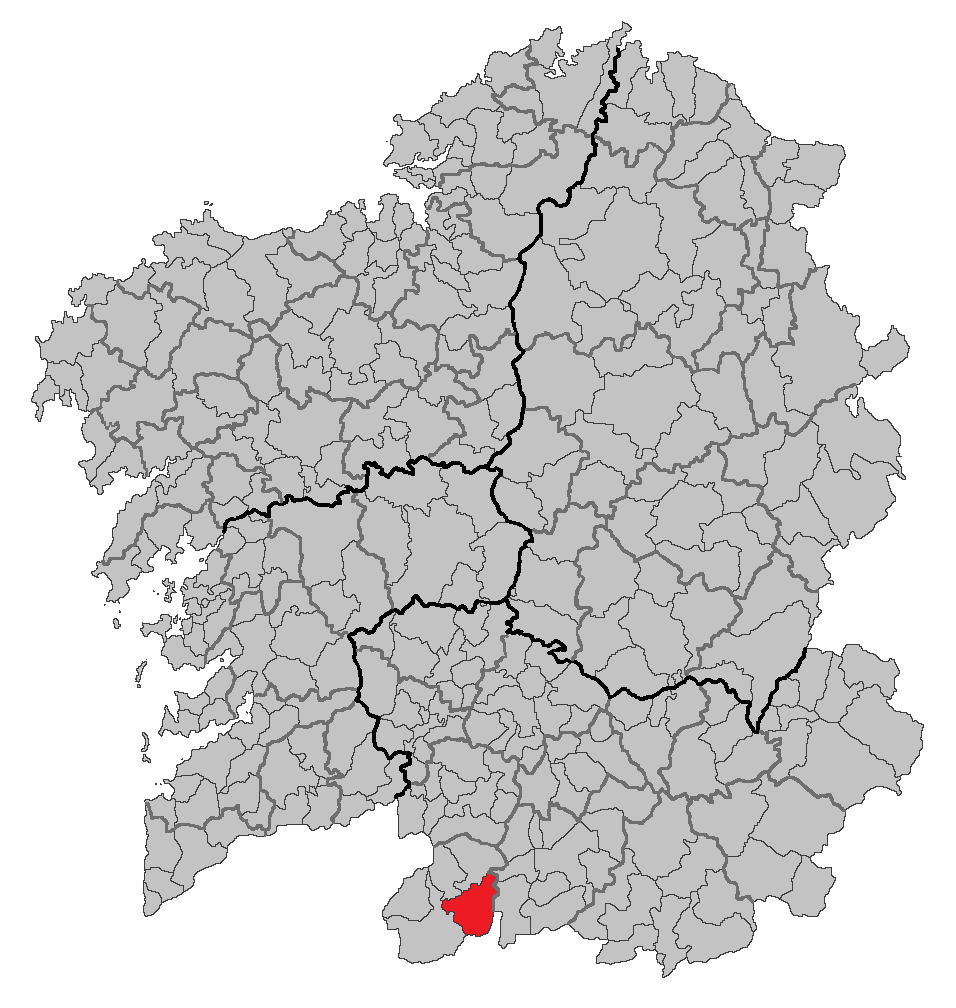 Mapa coa localización do concello de Muíños.